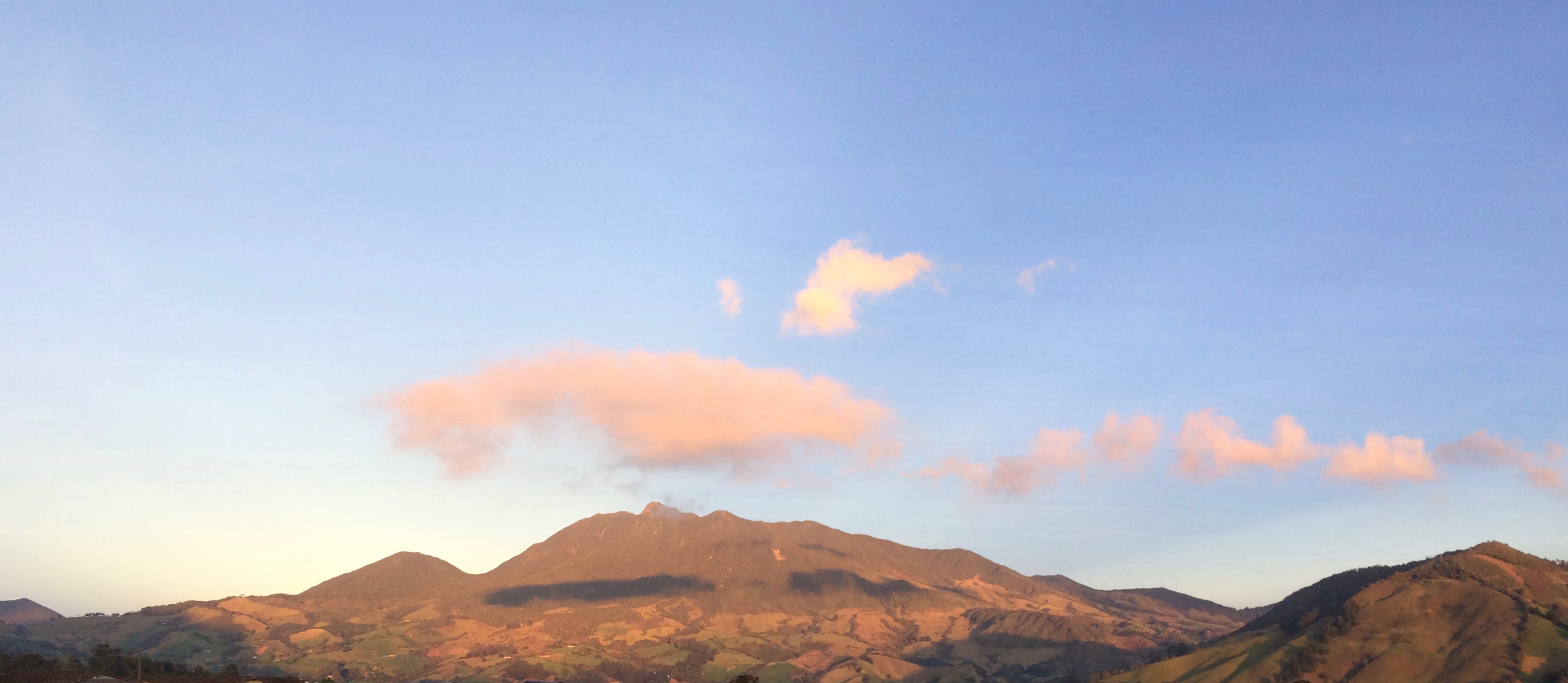 Vista general del Páramo de Sonsón.